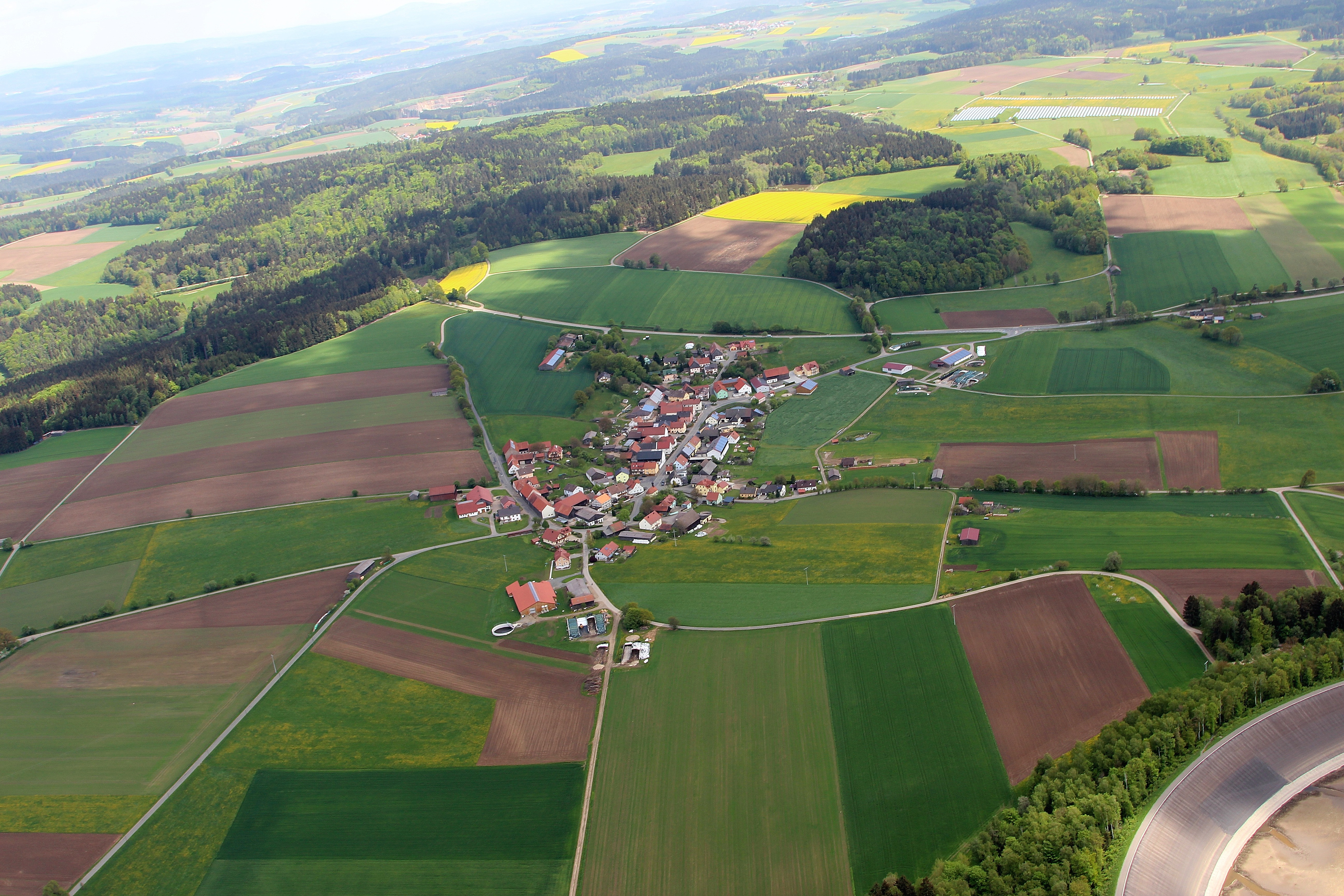 Großenschwand, Markt Tännesberg, Landkreis Neustadt an der Waldnaab, Oberpfalz, Bayern